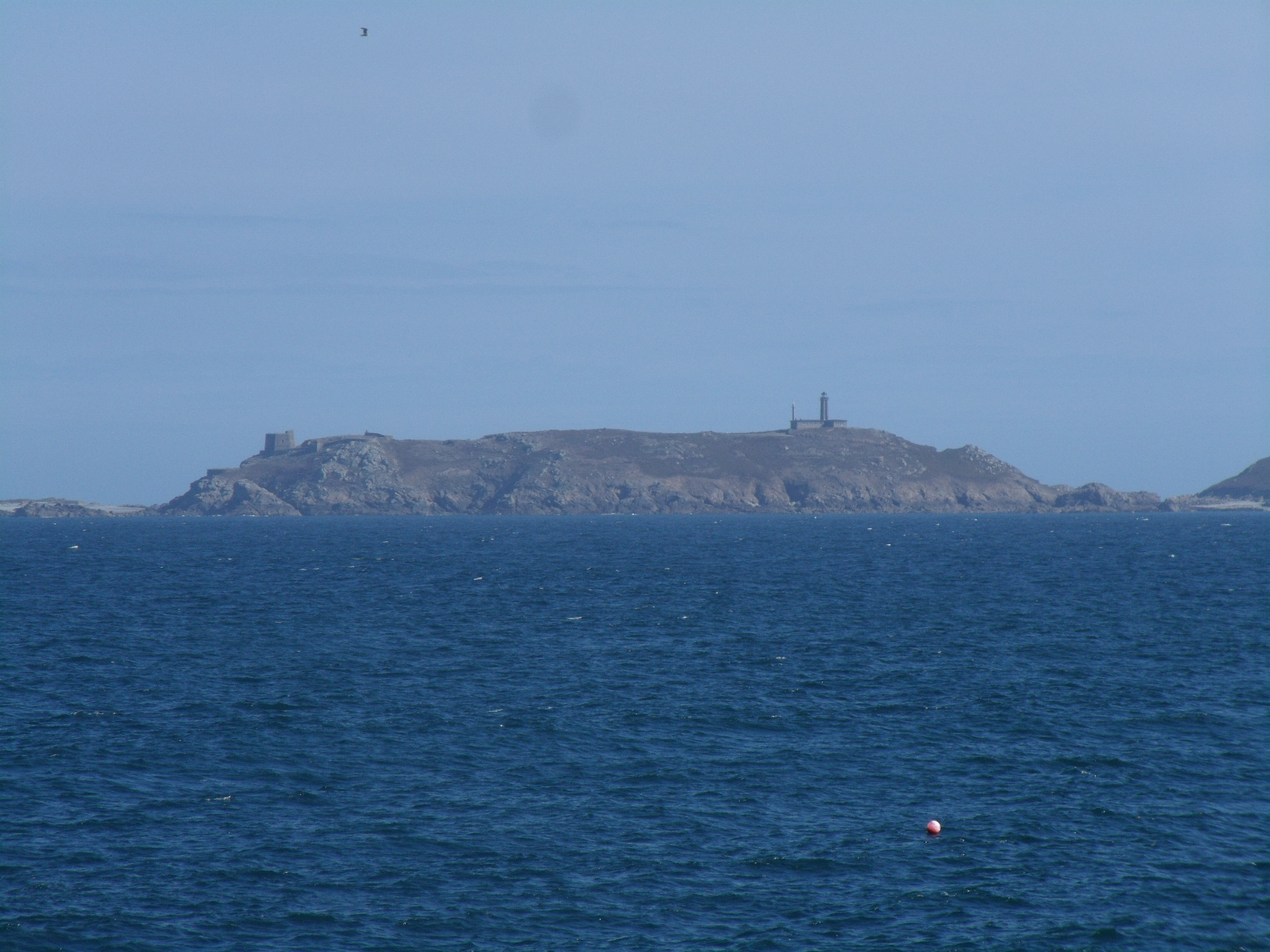 L'Île aux moines vue de l'Île Renote